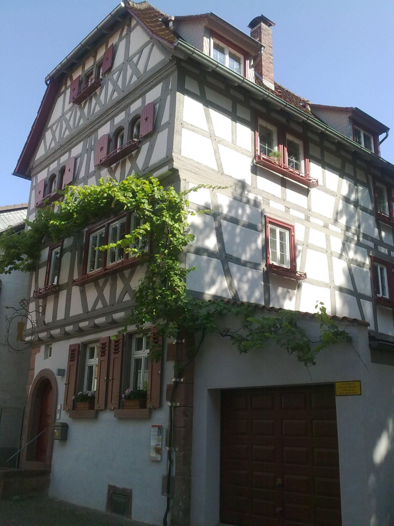 Das Jägerhaus in der Curtigasse, einziges erhaltenes Neben- und Wohngebäude des Wambolt'schen Schlossareals in Groß-Umstadt